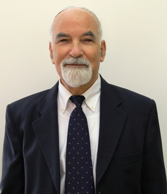 פרופסור שרביט - רקטור המכללה האקדמית אשקלון